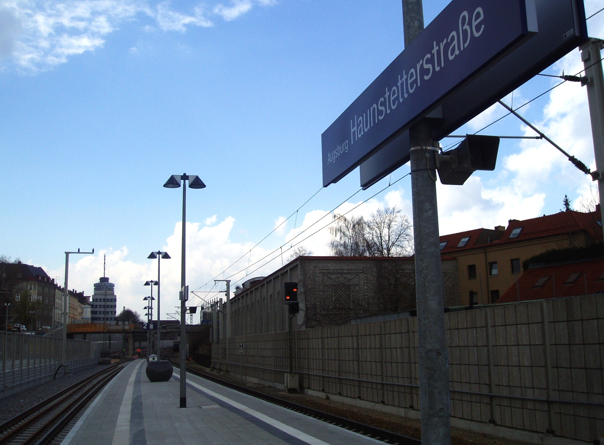 Bahnhof Augsburg Haunstetter Straße